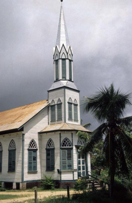 Dia. Kerk van de Evangelische Broedergemeente aan de Mijnaartstraat (eerder Voorstraat)